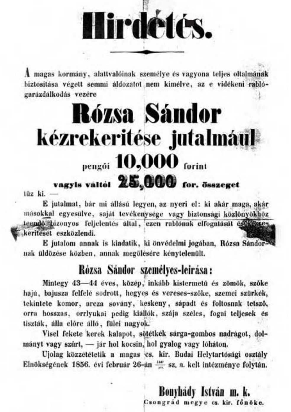 Rózsa Sándor körözési hirdetménye1856-ból. Rózsa Sándor a Délvidék leghíresebb betyárja volt. Az édesapját lólopás miatt akasztották föl még gyermekkorában.